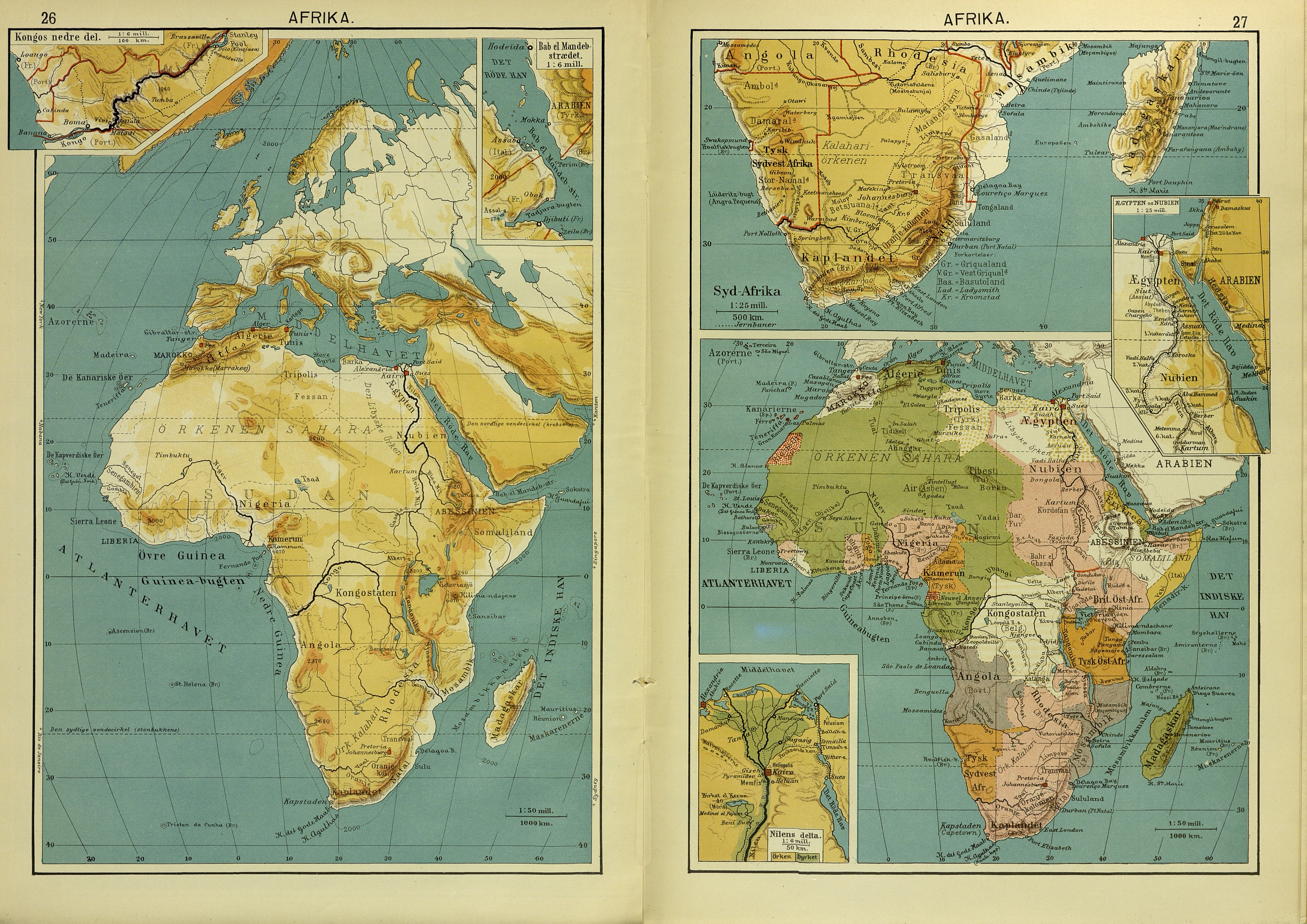 Kart over Afrika fra Ivar Refsdals Skole-Atlas (1910)